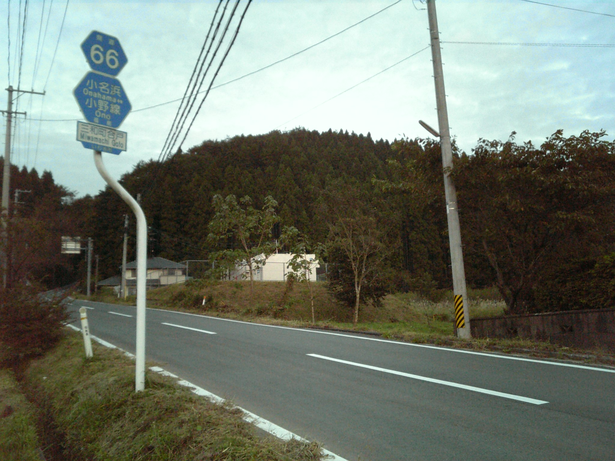 福島県道66号小名浜小野線。いわき市三和町合戸付近。